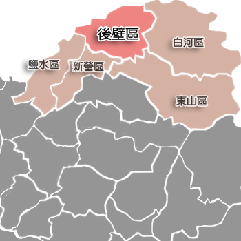 後壁區相對位置